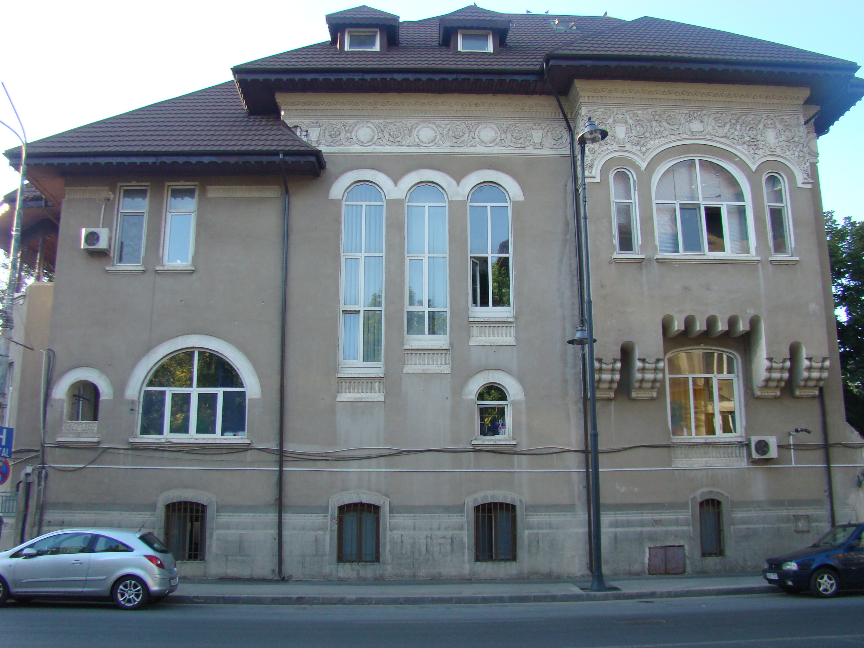 Clădire monument istoric, str. Ion Mincu, nr.5-7 (fostul Sanatoriu "Dr. Antoniu")